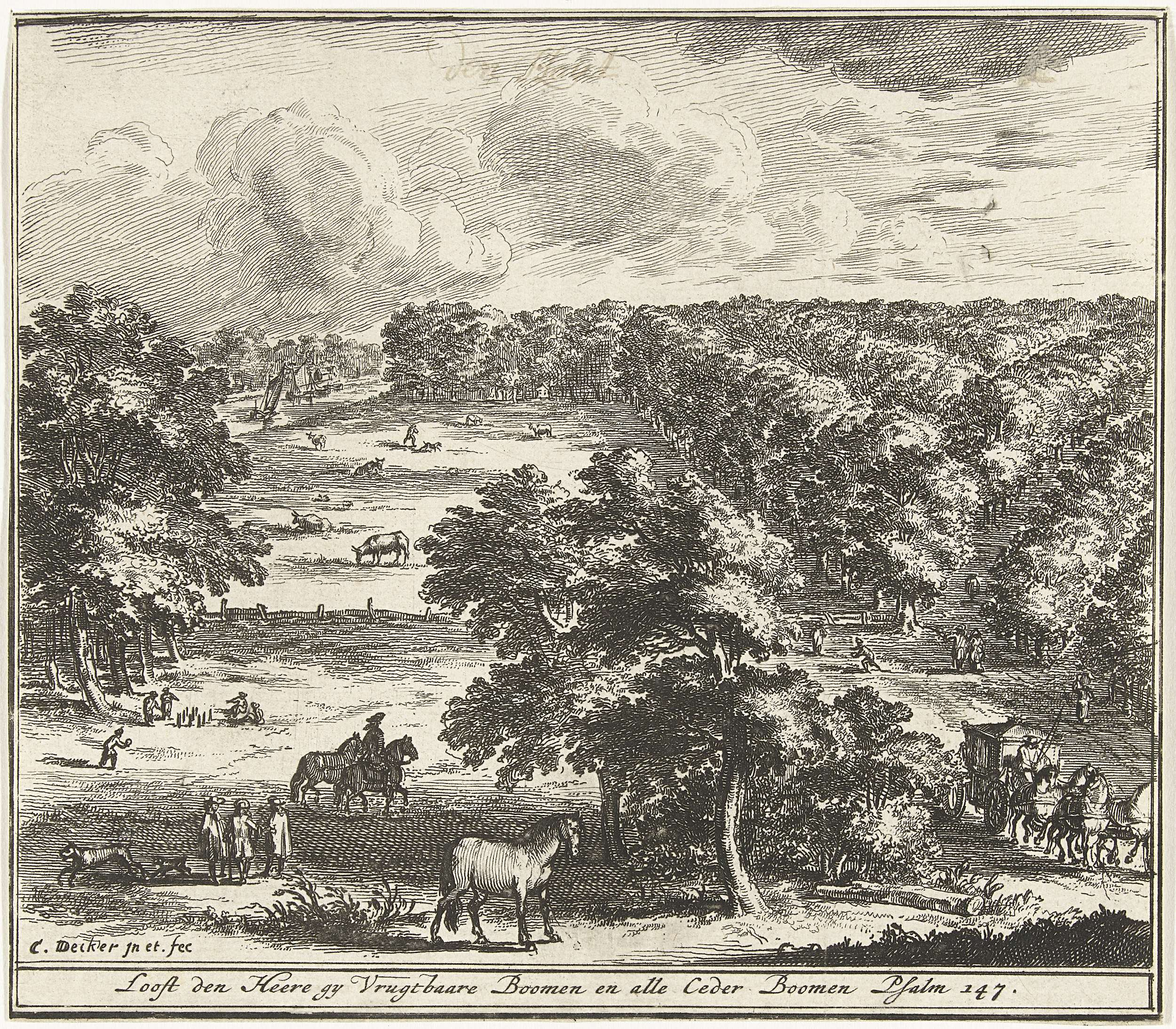 Landschap met bomen in vogelvluchtperspectief, mannen vermaken zich met buiten activiteiten. In ondermarge regel uit psalm 147.; Iconclasscode: 25G3; print; boekillustratie